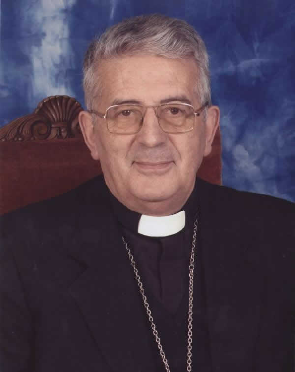 Mons. Dieguez Reboredo